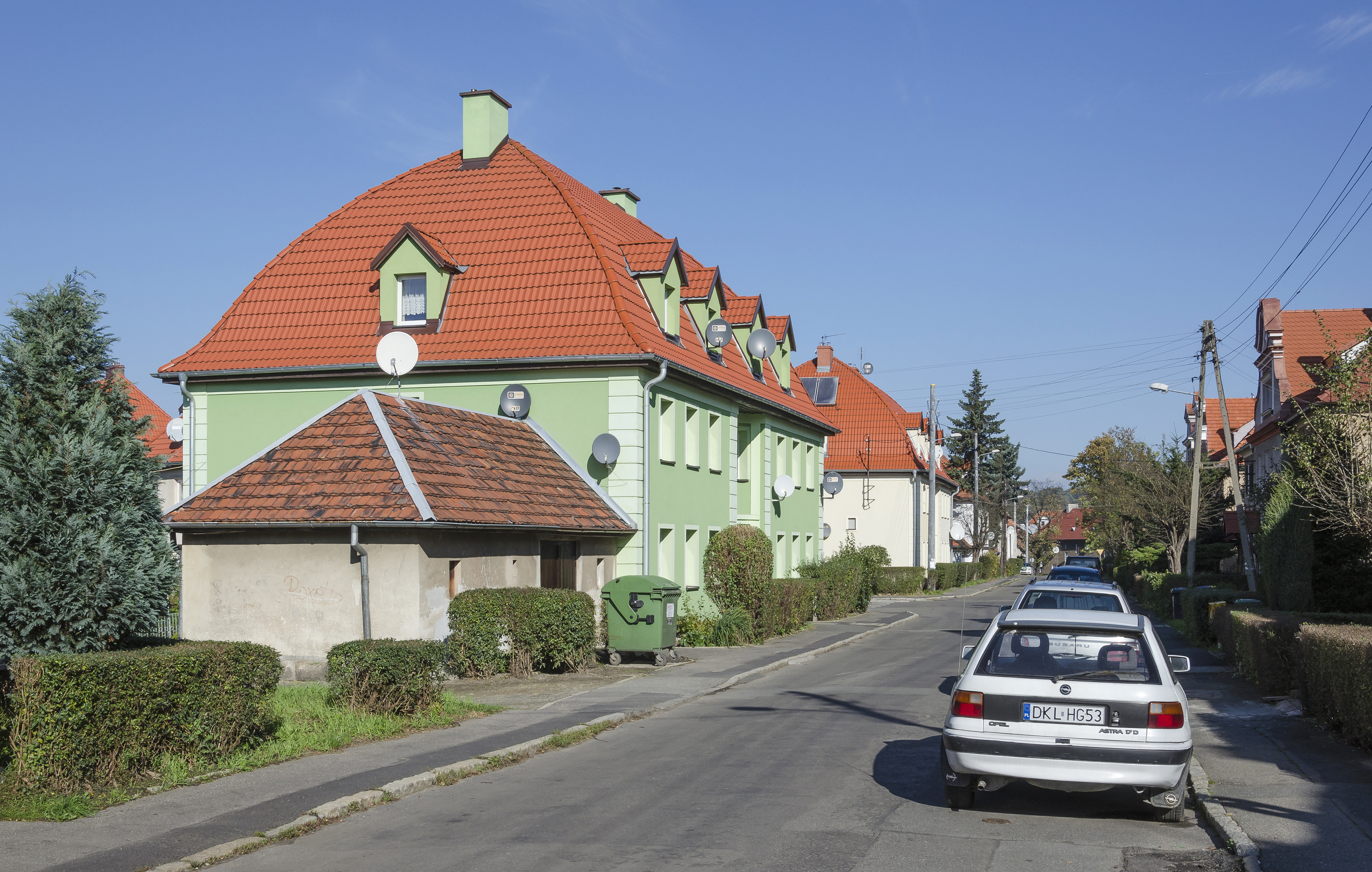 Kłodzko, ul. Tetmajera